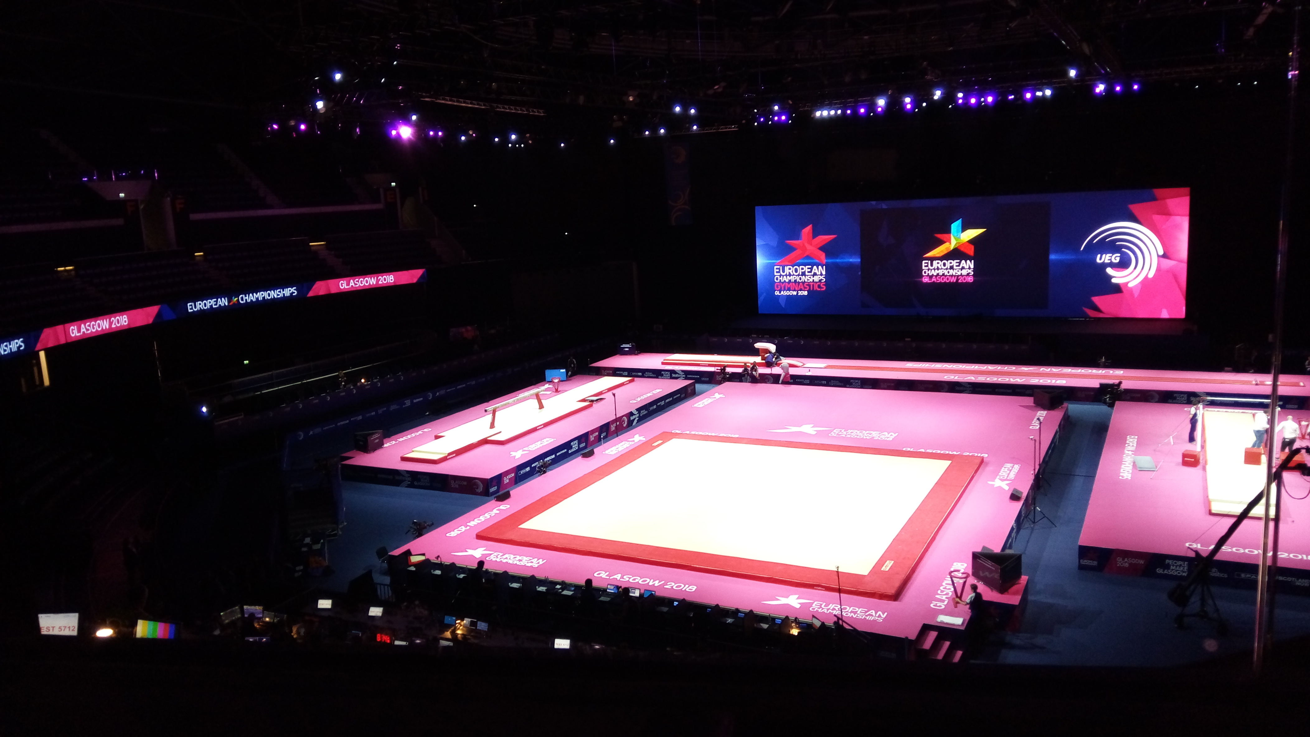 Sec Hydro